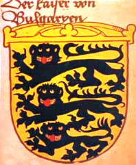 Герб на императора на България